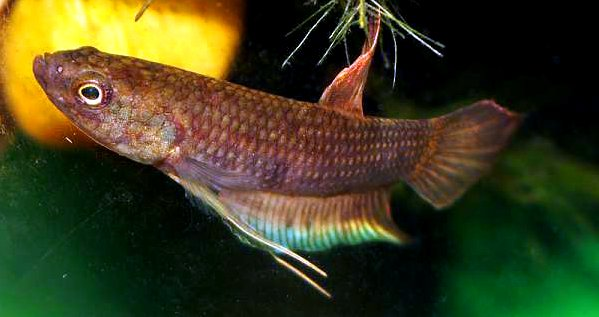 male Betta dimidiata